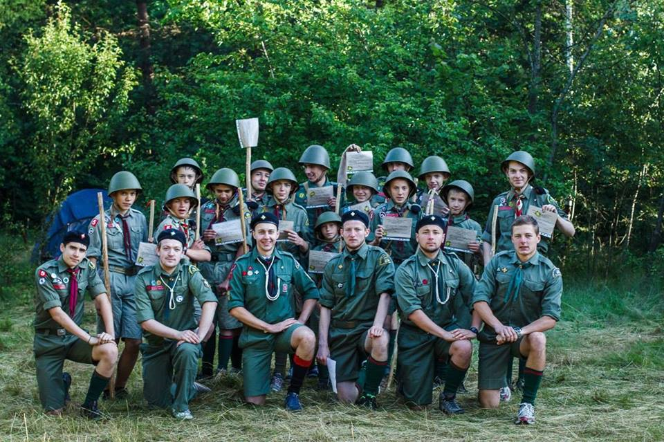 Це ми